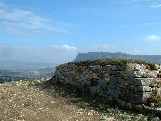 Vista de parte de la muralla romana en el Monte Cildá, en Olleros de Pisuerga, España.